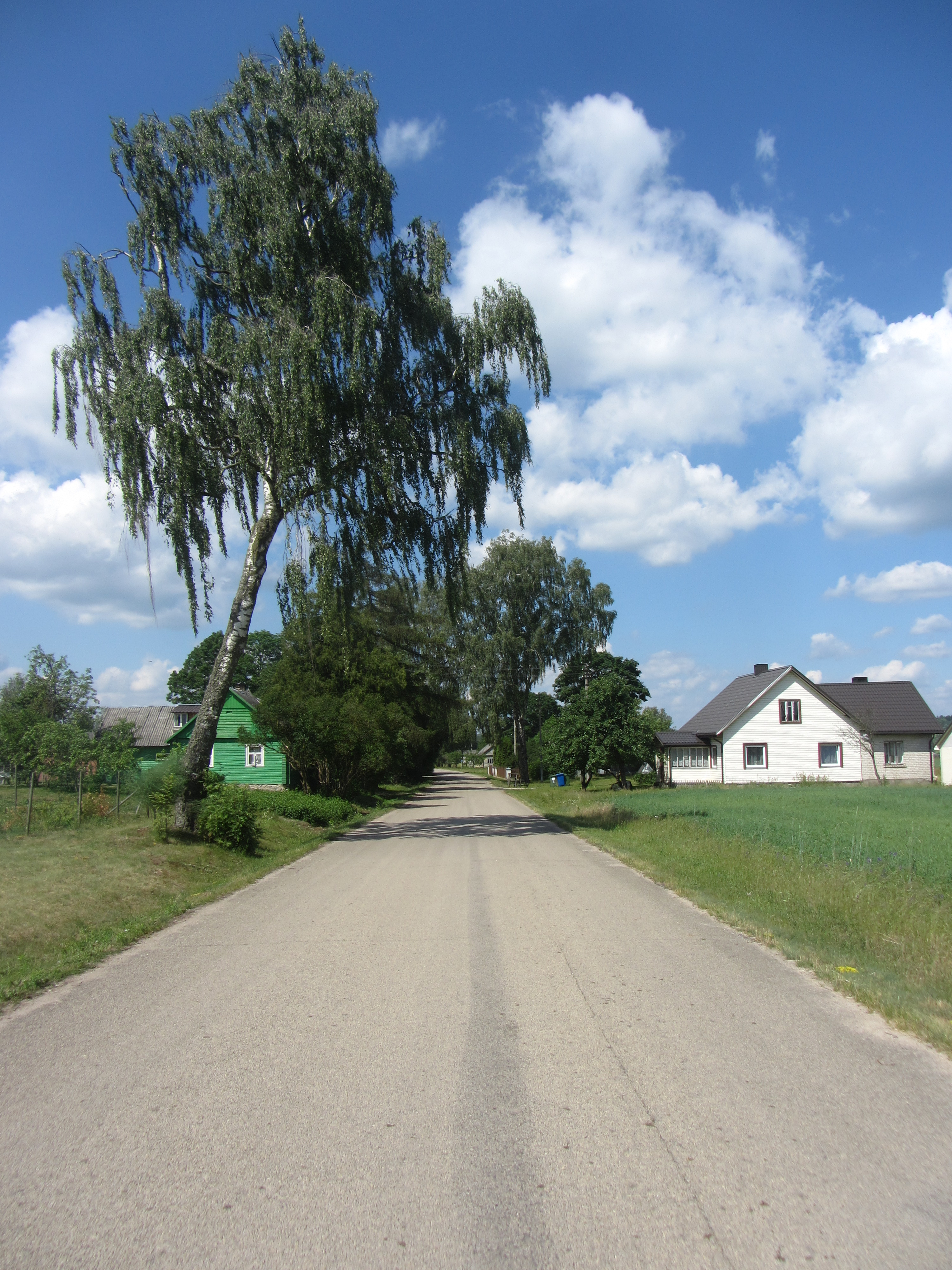 Nemajūnai, Lithuania